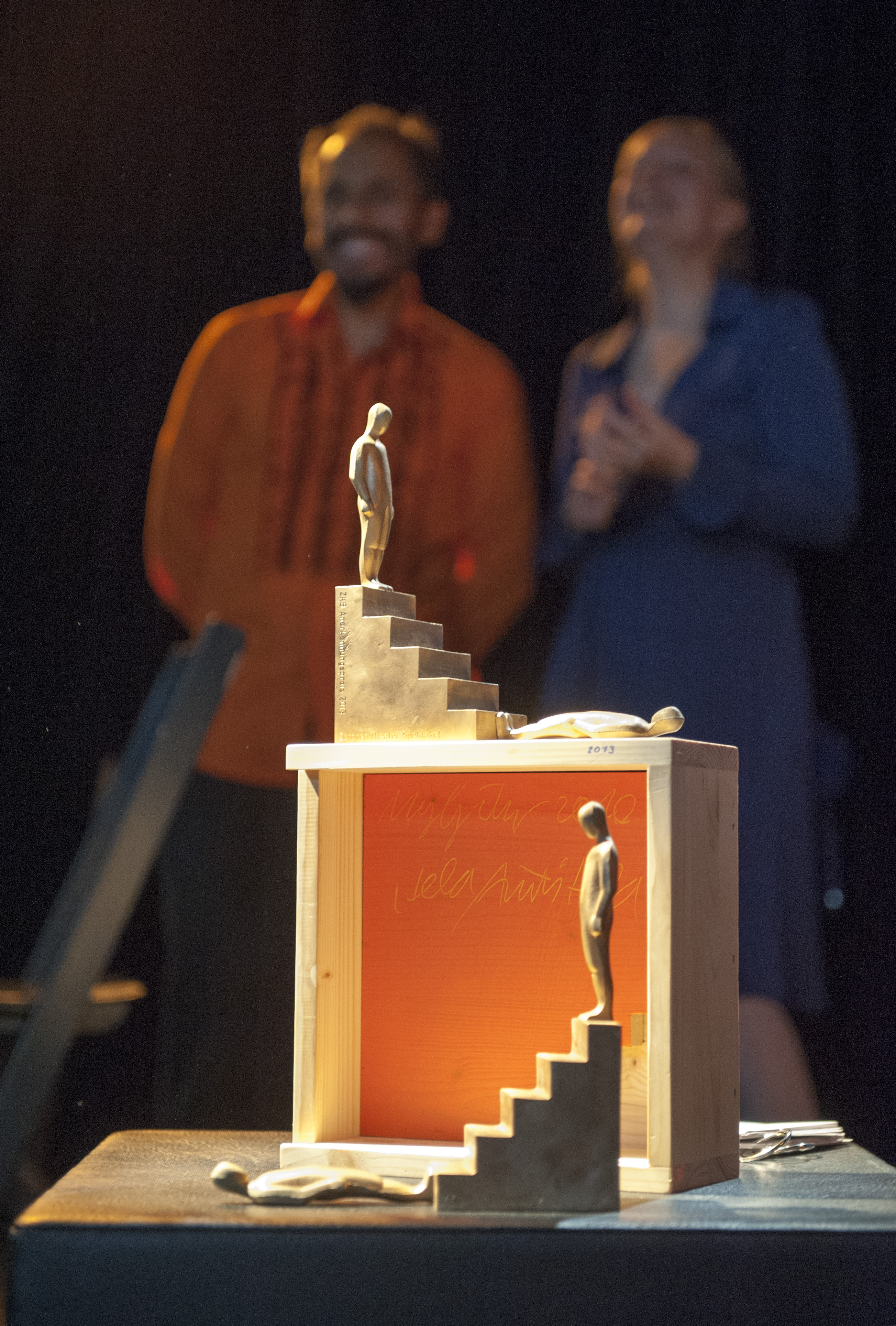 Skulptur Held Anti Held des Zürcher Künstler Max Grüter